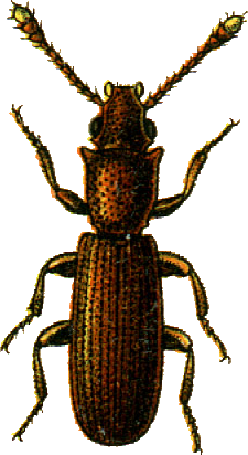 This file has been extracted from another file: Jacobs20.jpg